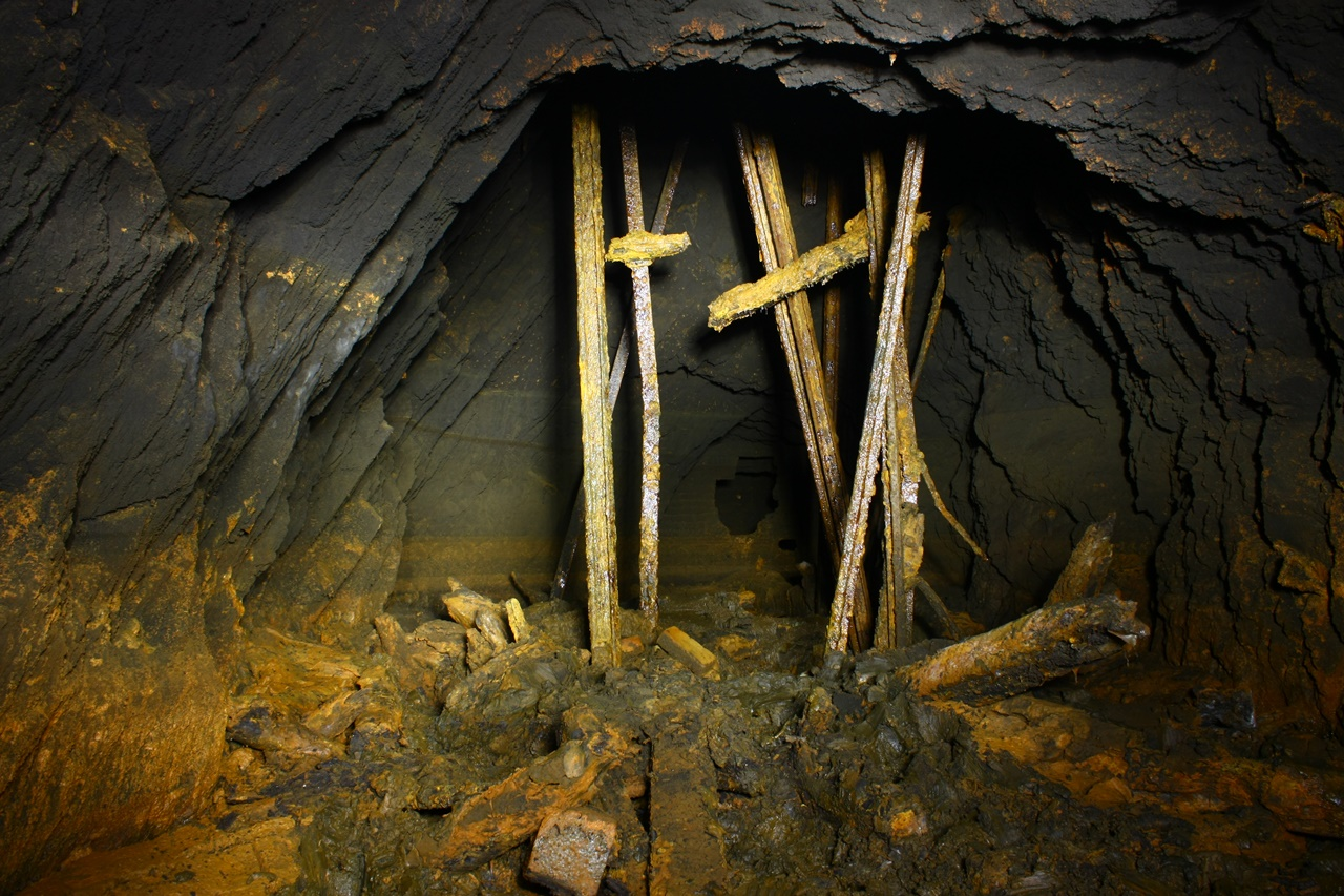 Schacht Apfelbaum